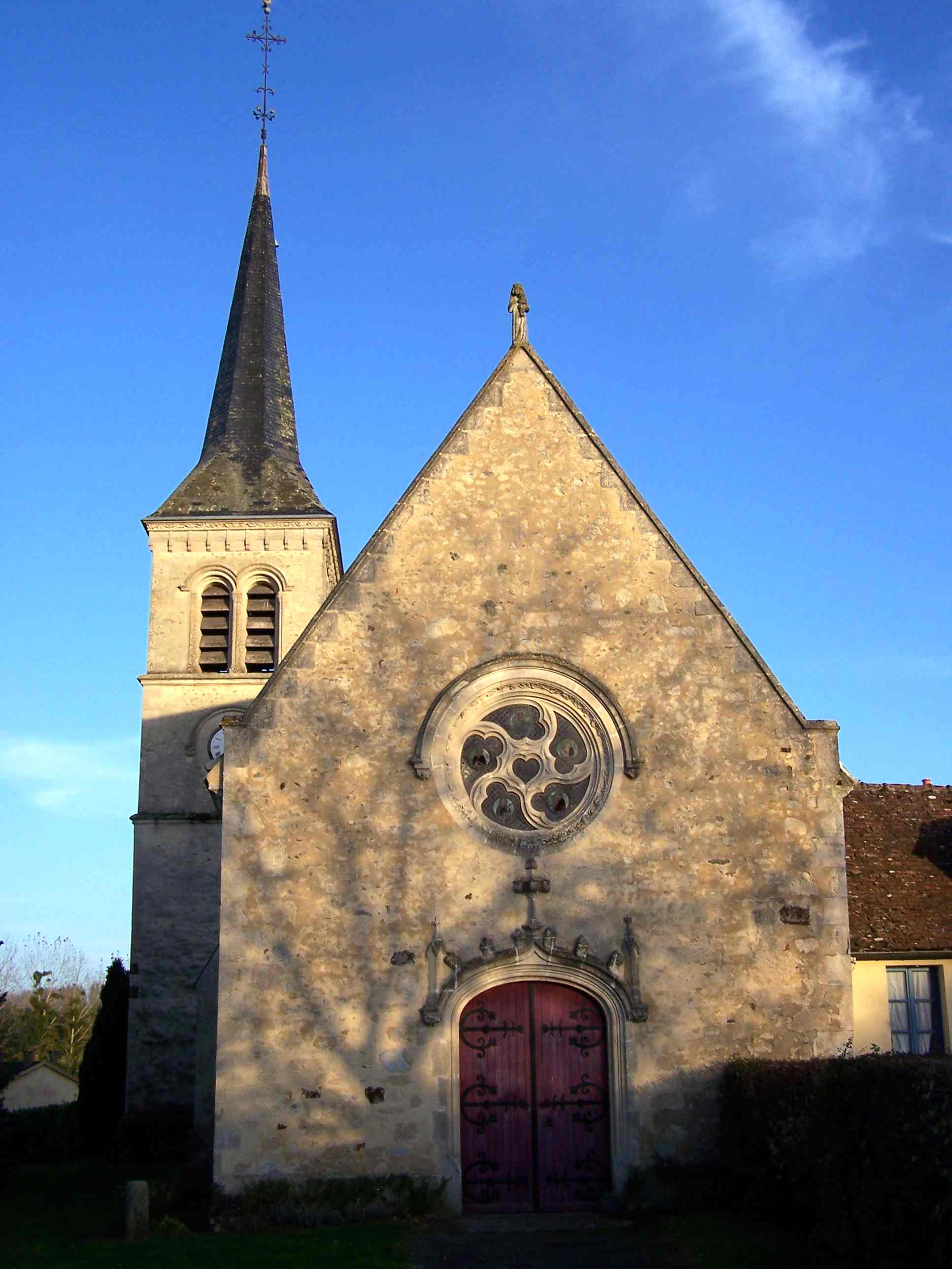 Eglise de Grandchamp_Sarthe